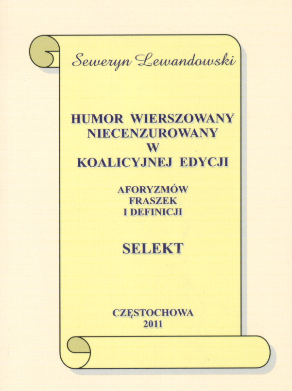 HUMOR WIERSZOWANY SELEKT